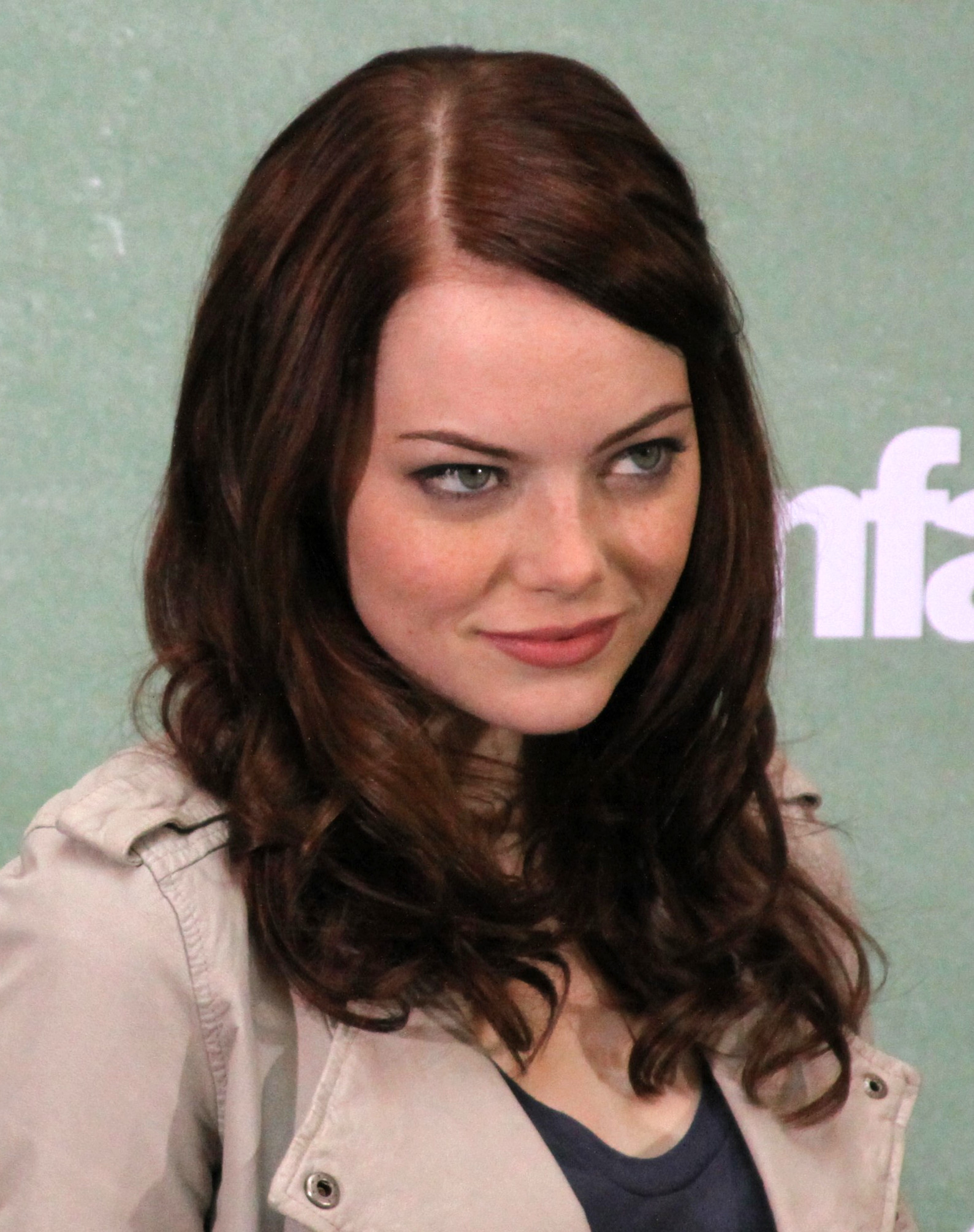 Emma Stone auf einem Fototermin im Oktober 2010 in Berlin